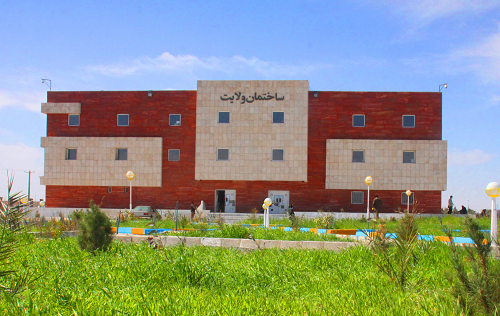 ساختمان ولایت